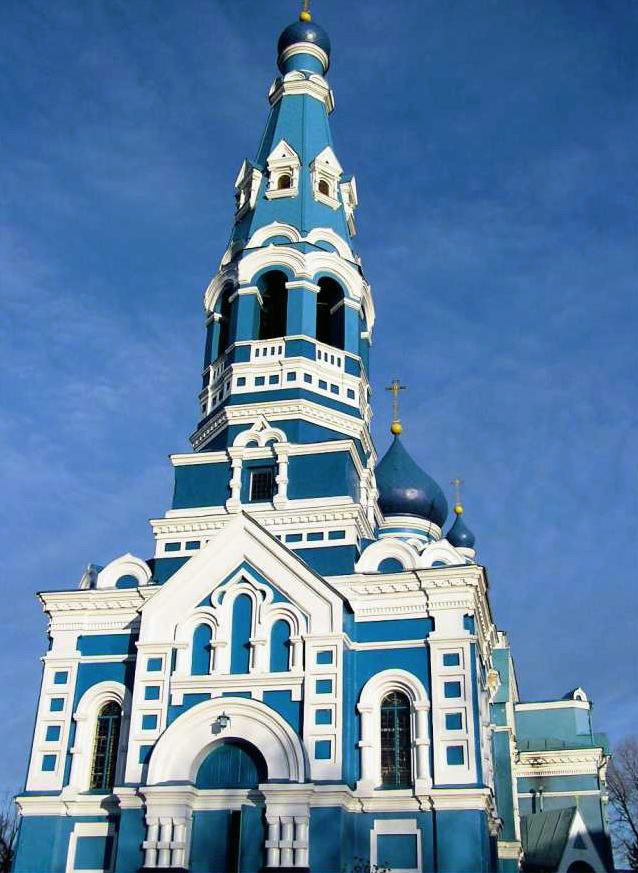 Свято-Успенский собор в городе Балта.